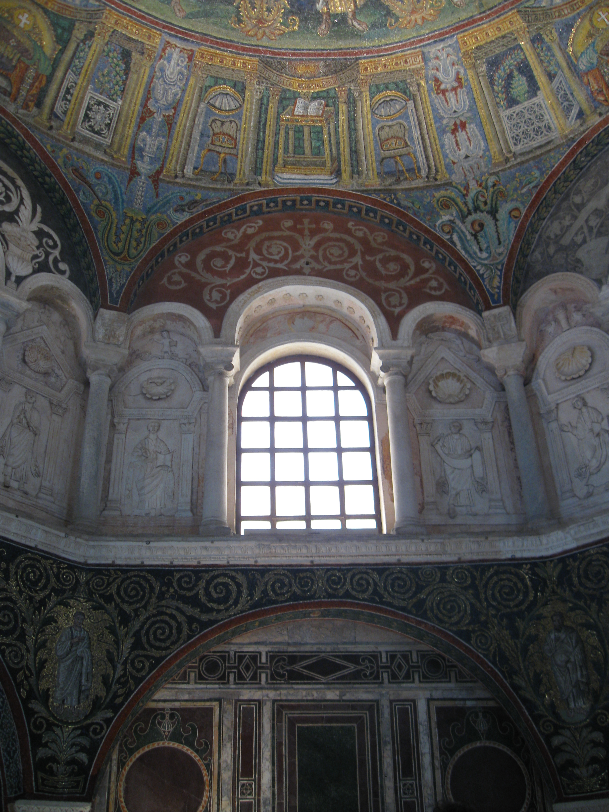 Battistero Neoniano - MIBAC This is a photo of a monument which is part of cultural heritage of Italy.